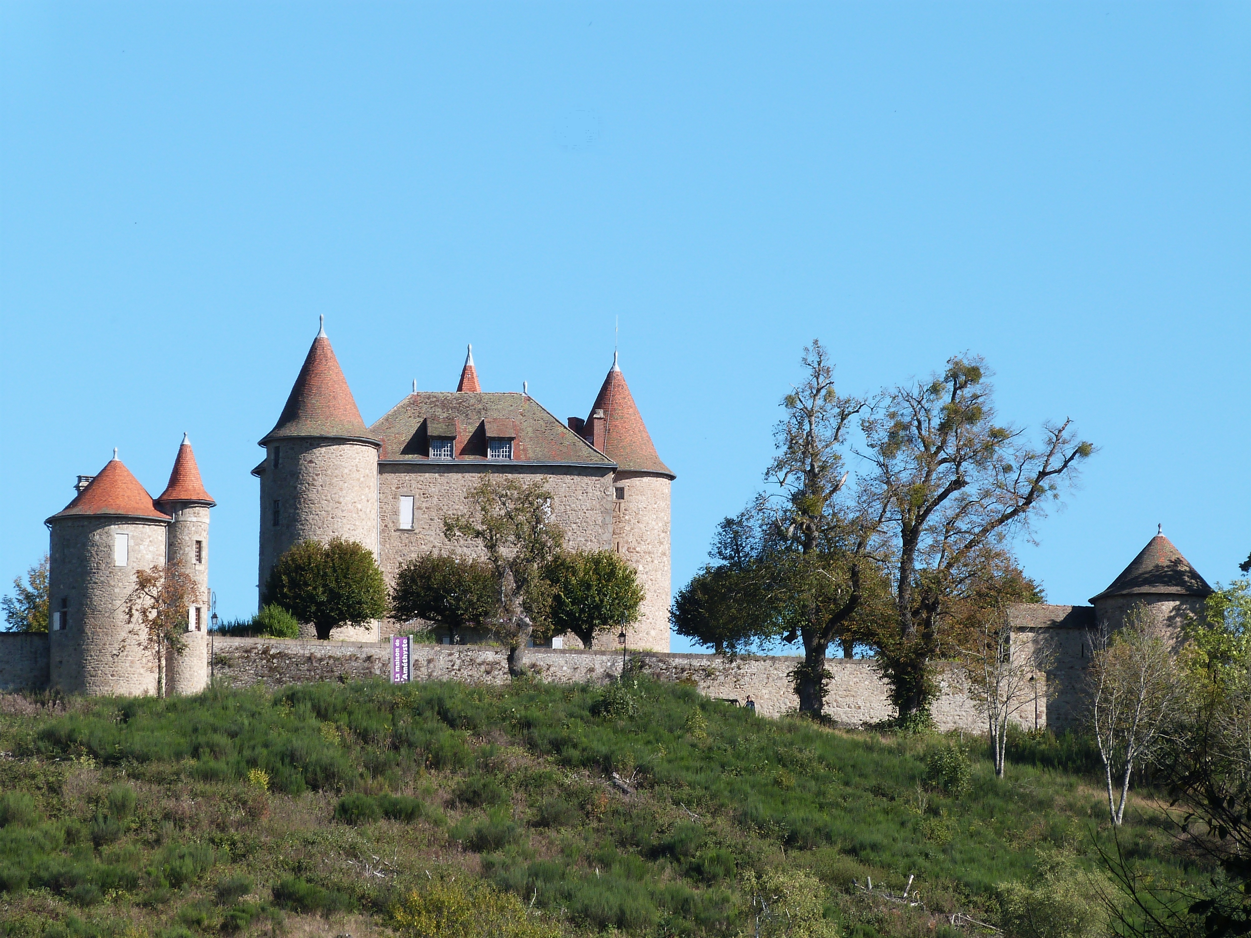 Château de Montfort de la Reynerie vu depuis la départementale